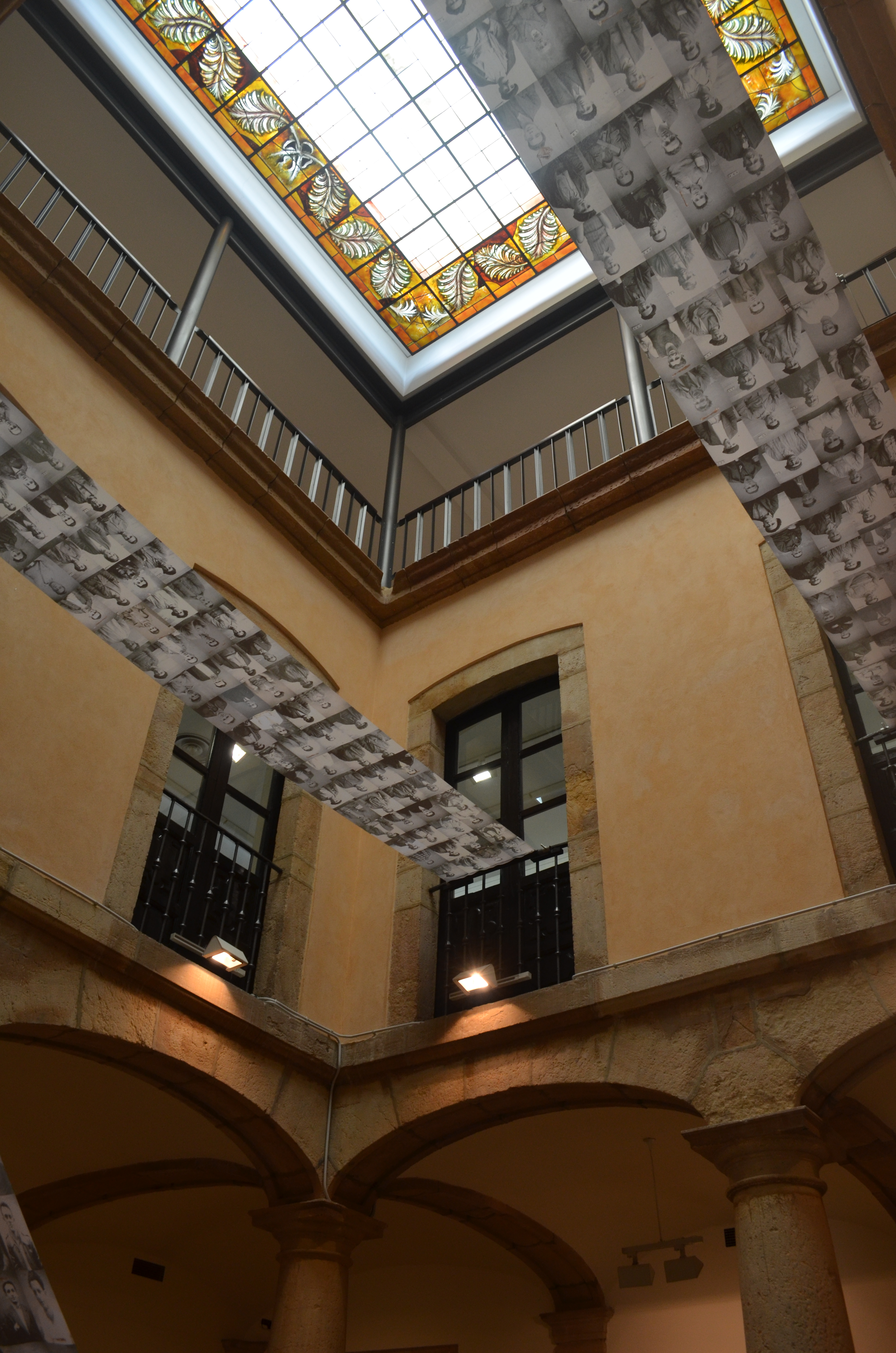 Interior del Museo de Bellas Artes de Asturias